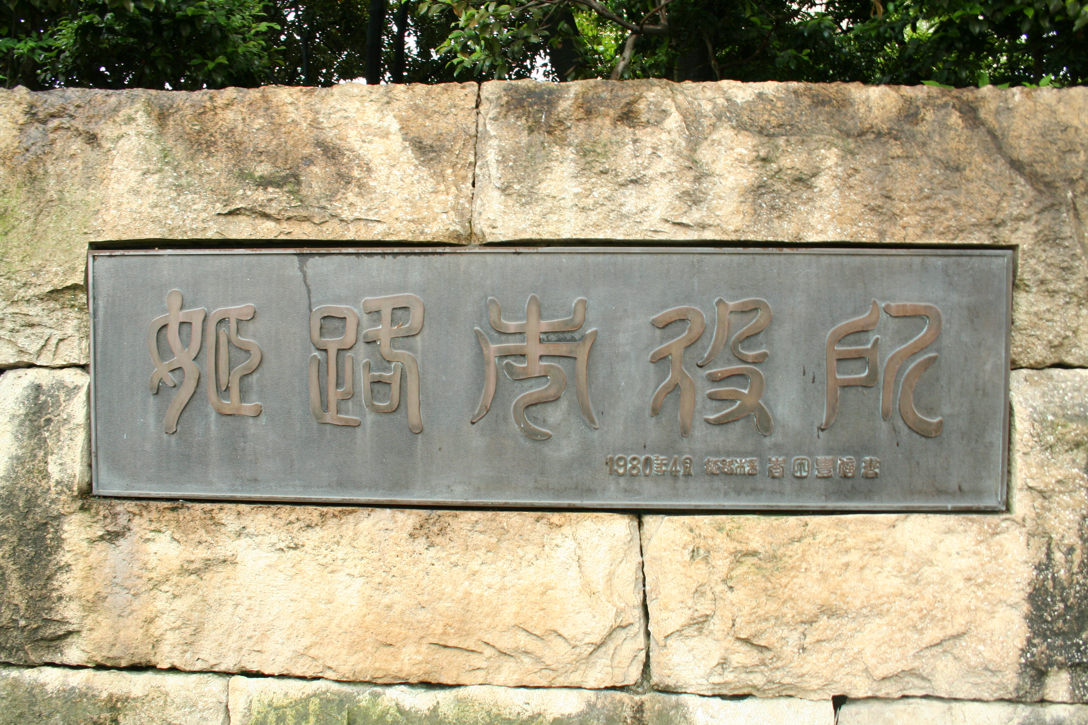 姫路市役所西側正門にある看板。